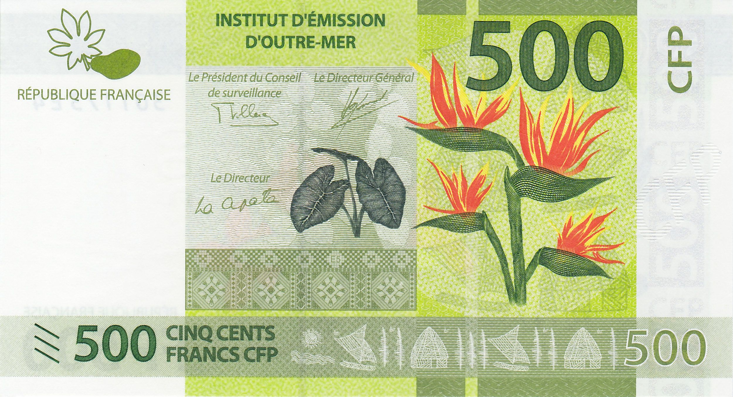 Billet en francs Pacifique (série de 2014)